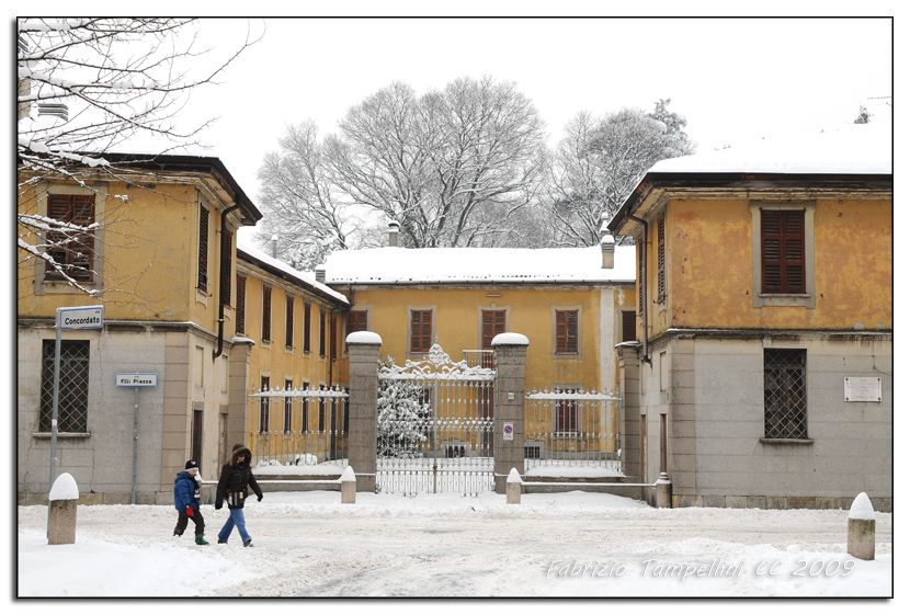 Villa in via Fratelli Piazza - Cuggiono